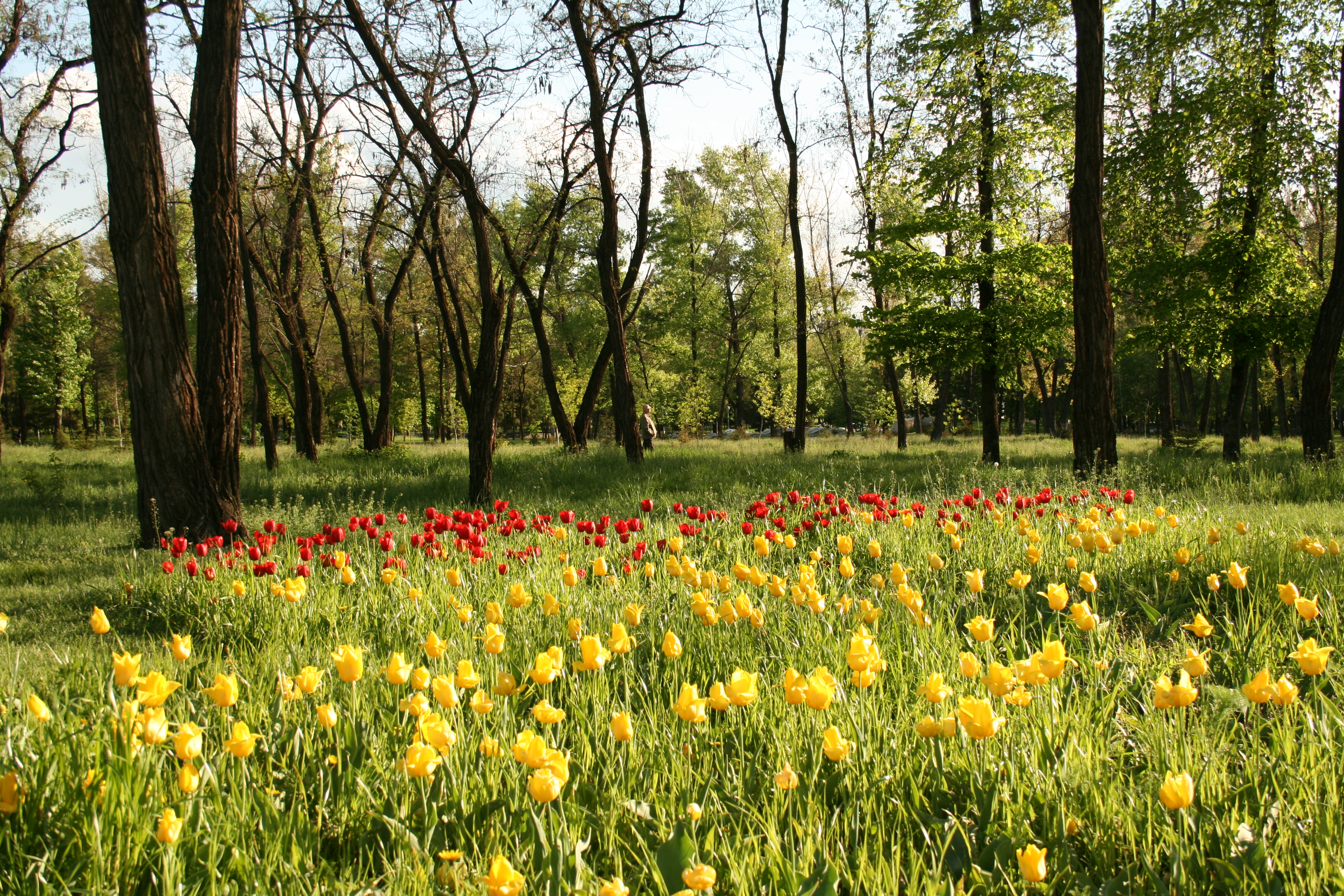 Парк памяти павших в Великой Отечественной войне. Белгород, пр. Б. Хмельницкого.